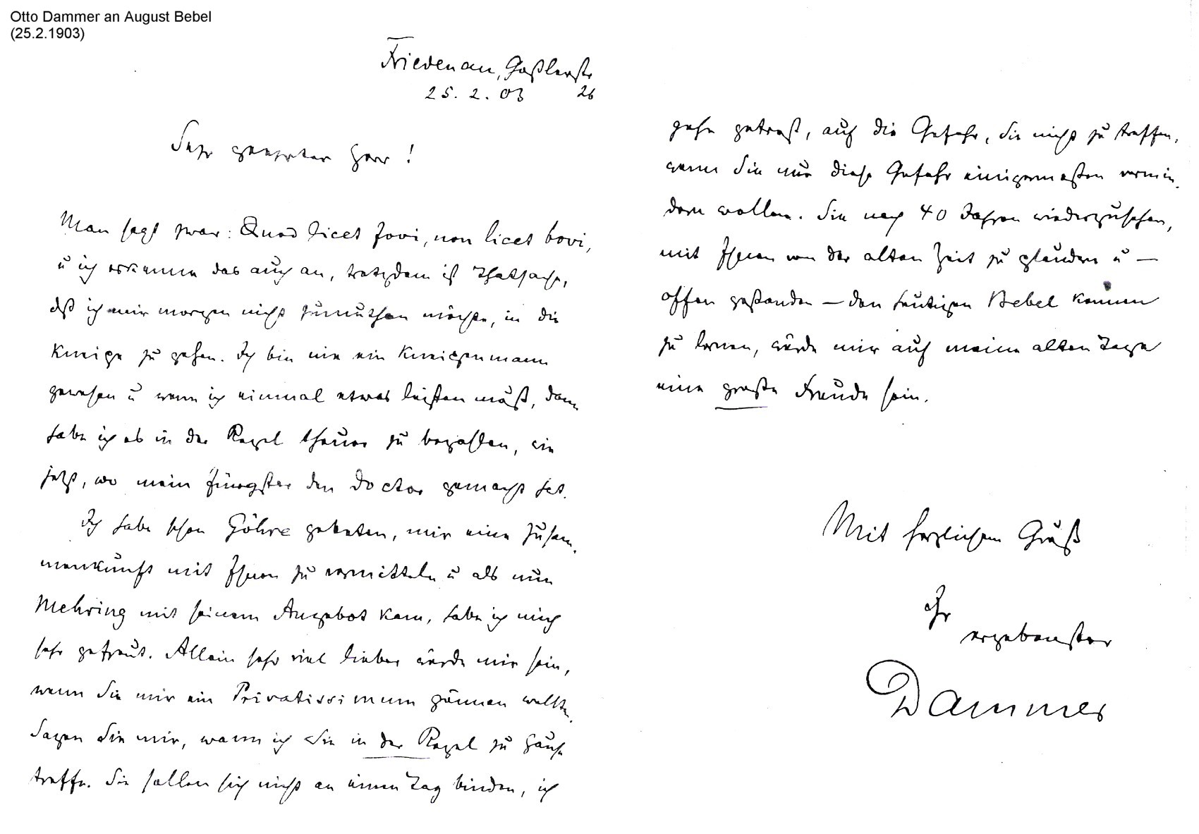 Brief von Dr. Otto Dammer (1839–1916) an August Bebel